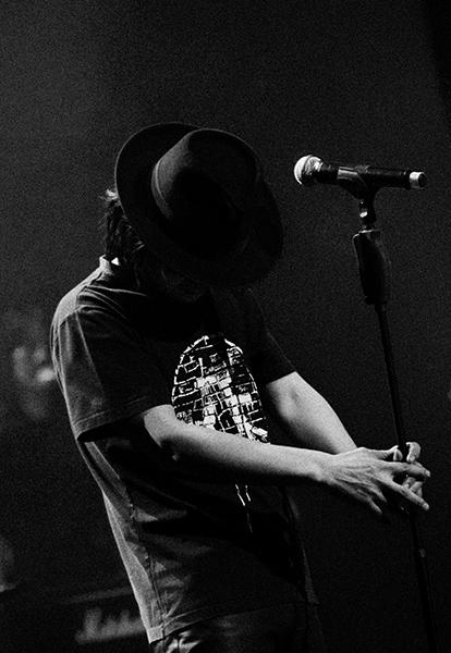 中文（中国大陆）: 左小祖咒